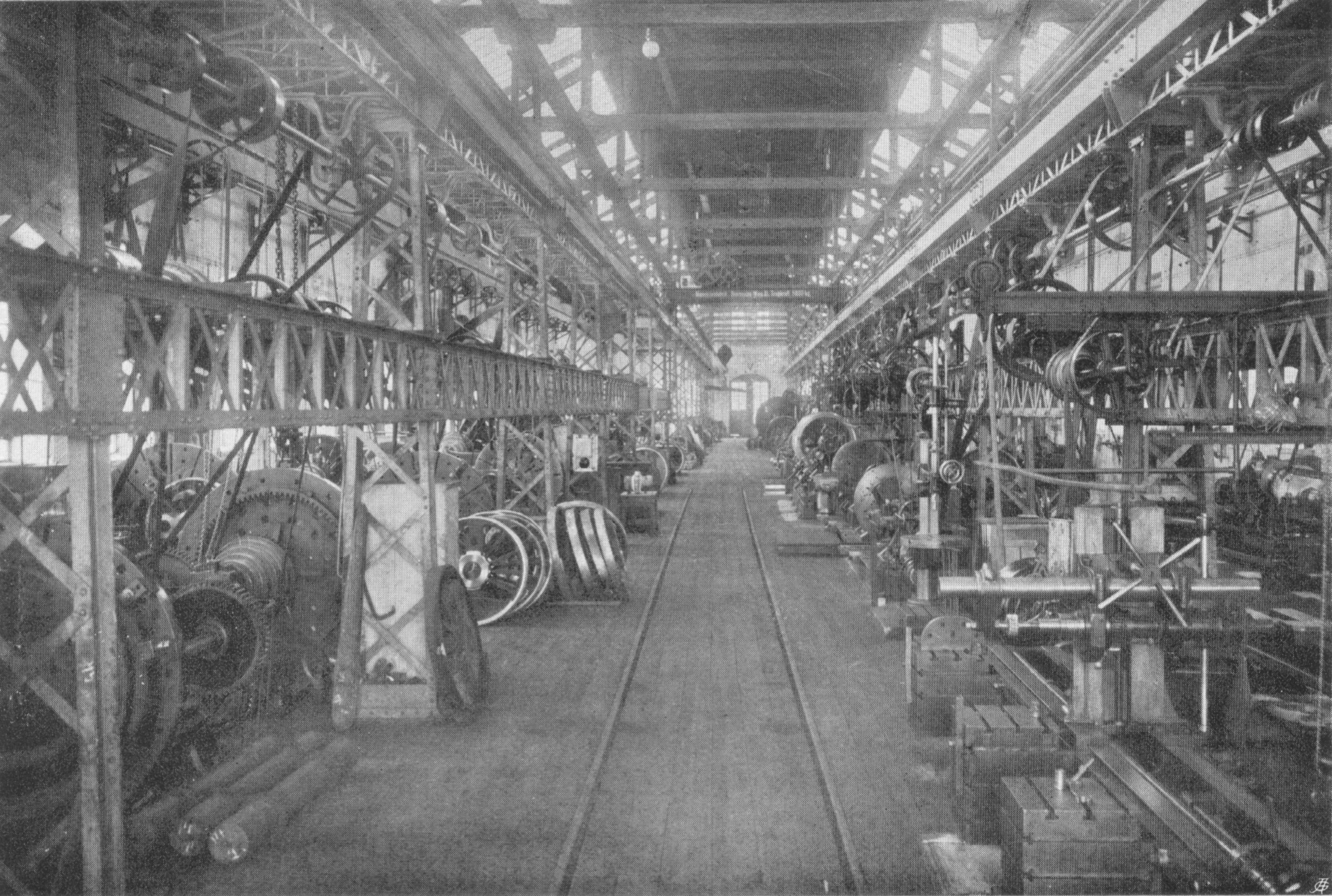 Räderwerkstätte der Wiener Neustädter Lokomotivfabrik